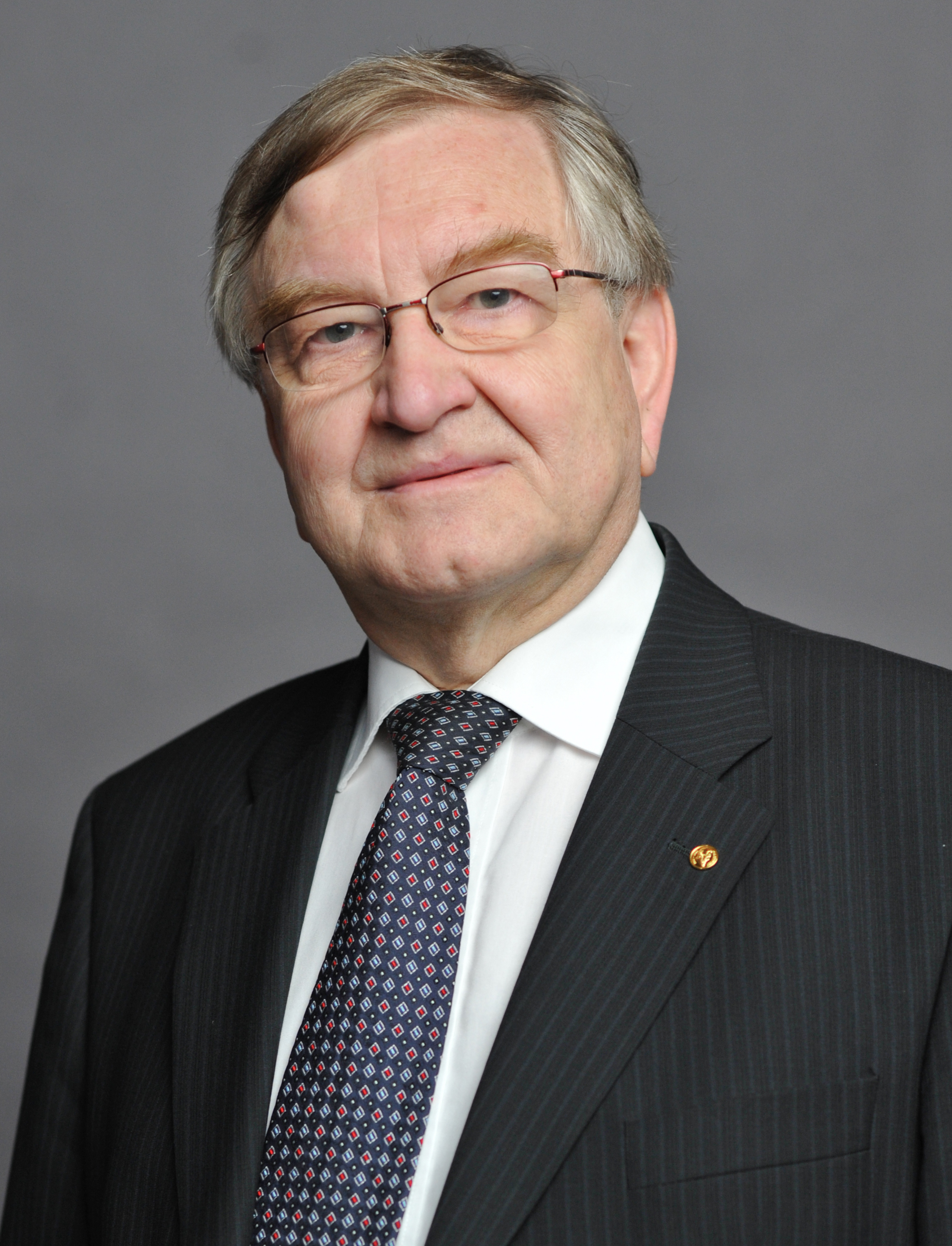 Prof. Dr. Dr. Dr. h.c. Andreas Bockisch (Foto: Leopoldina)